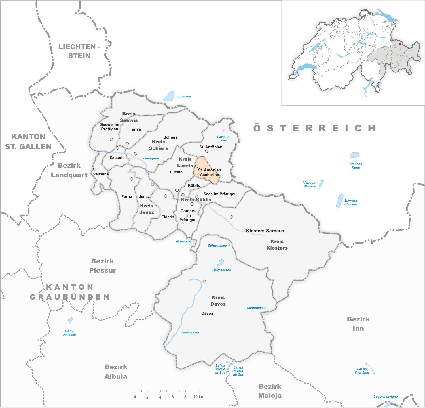 Municipality St. Antönien Ascharina Artist: Tschubby